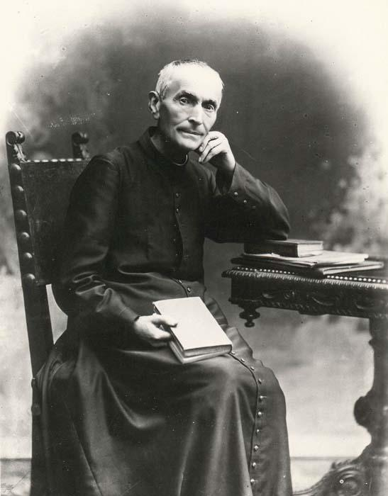 Beato Michele Rua